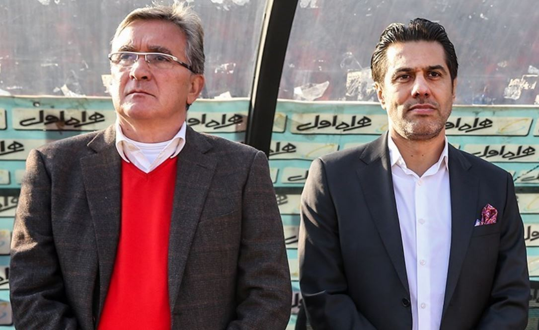 افشین پیروانی و برانکو ایوانکوویچ در بازی پرسپولیس و تراکتورسازی در استادیوم آزادی تهران